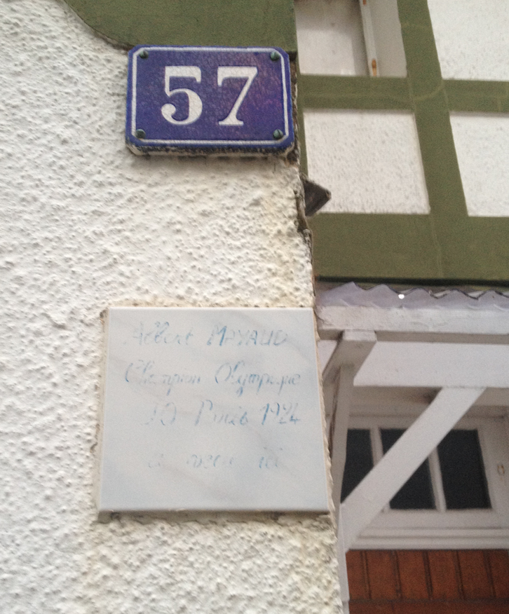 Albert Mayaud - Le Touquet-Paris-Plage - son domicile au 57, rue Léon Garet - sur la plaque on peut lire "Albert Mayaud champion olympique J.O. de Paris 1924 a vécu ici".